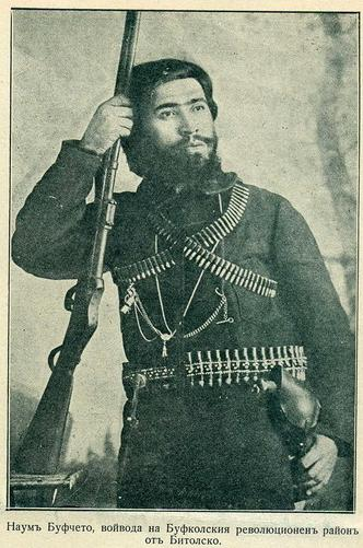 Наум Петров Буфски.